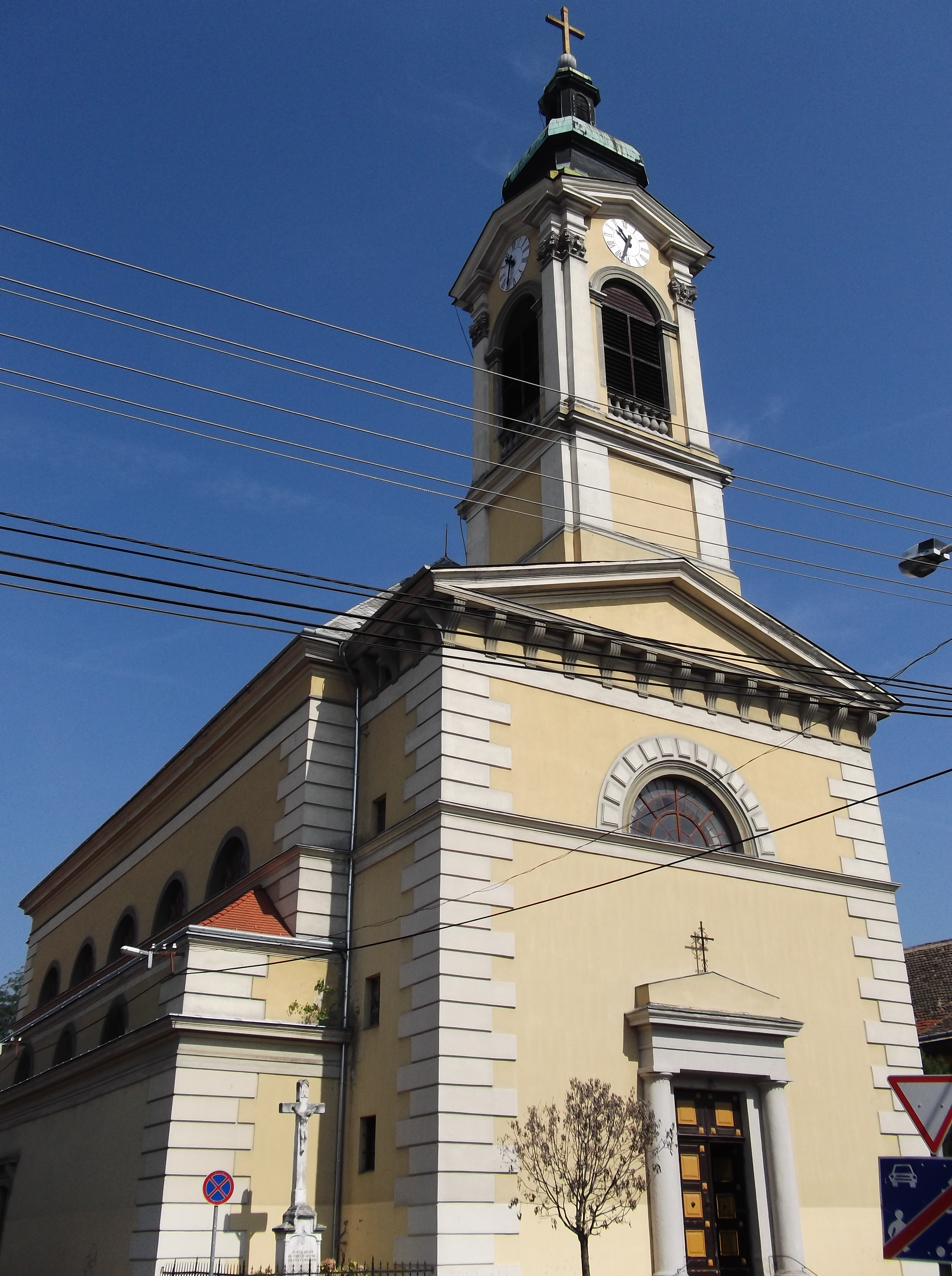 Újváros Roman catholic church. - 42 Kossuth Lajos utca, Győr, Hungary. - Újvárosi római katolikus plébániatemplom, azonosító 4308, törzsszám 2886. - Győr-Moson-Sopron, Győr, Kossuth Lajos u. 42.